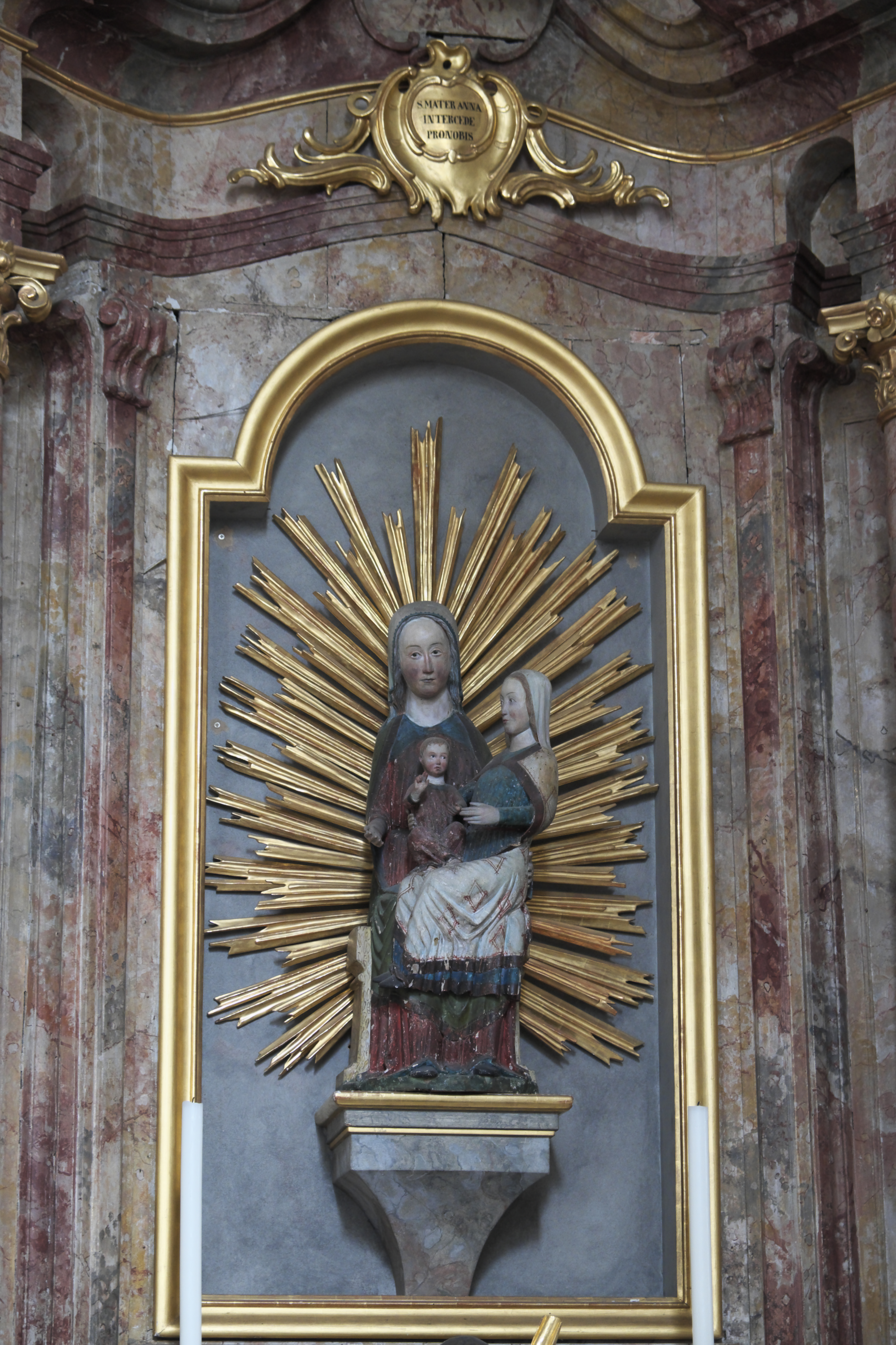 Katholische Stadtpfarrkirche St. Hippolyt im ehemaligen Ortsteil St. Pölten in Weilheim in Oberbayern im Landkreis Weilheim-Schongau (Bayern/Deutschland), Anna selbdritt aus dem frühen 13. Jahrhundert am nördlichen Seitenaltar